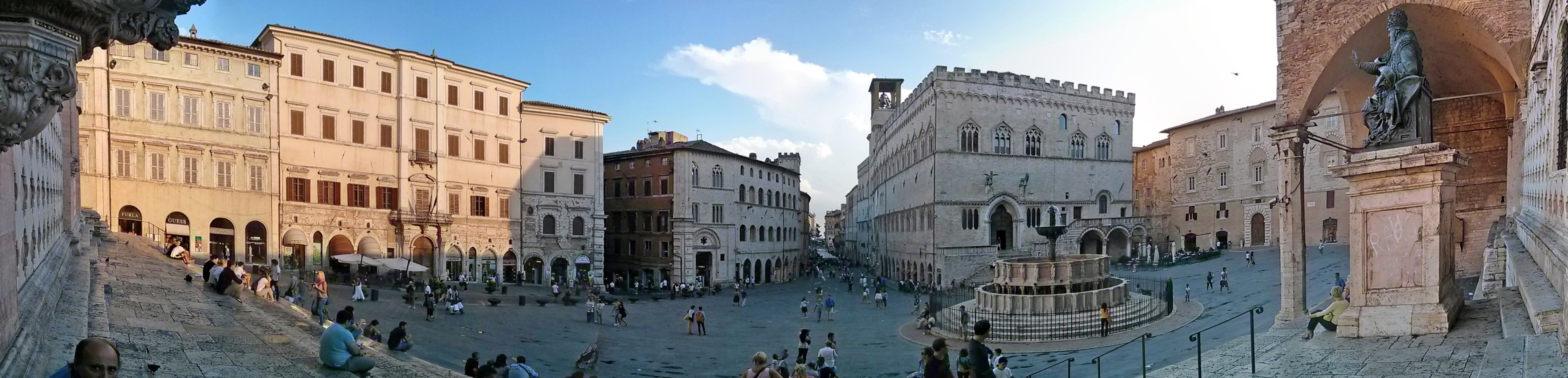 Palazzo dei Priori This is a photo of a monument which is part of cultural heritage of Italy.